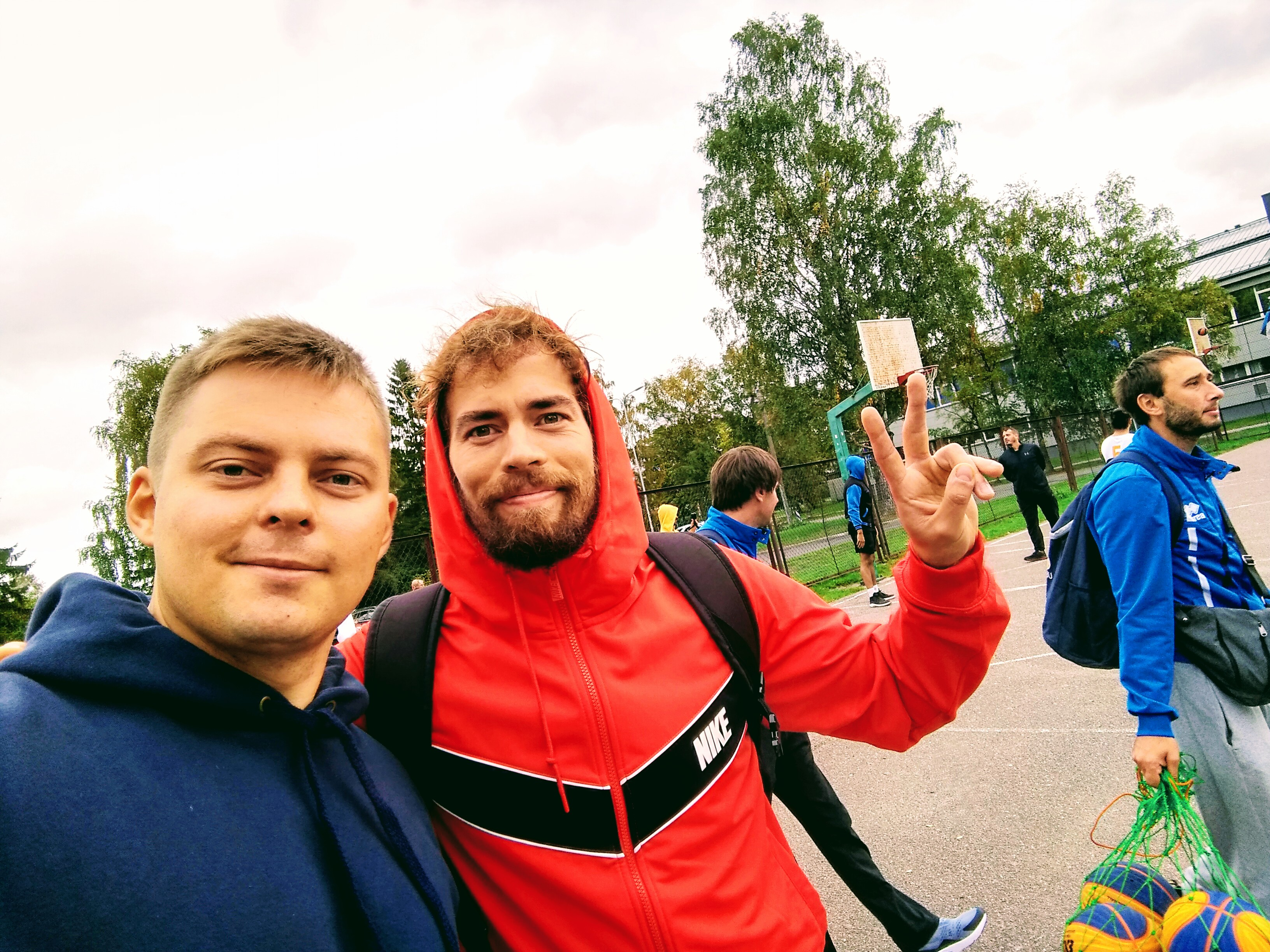 Kristiine 3x3 turniiril 2018 september